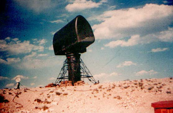 Nike Ajax acquisiton radar.